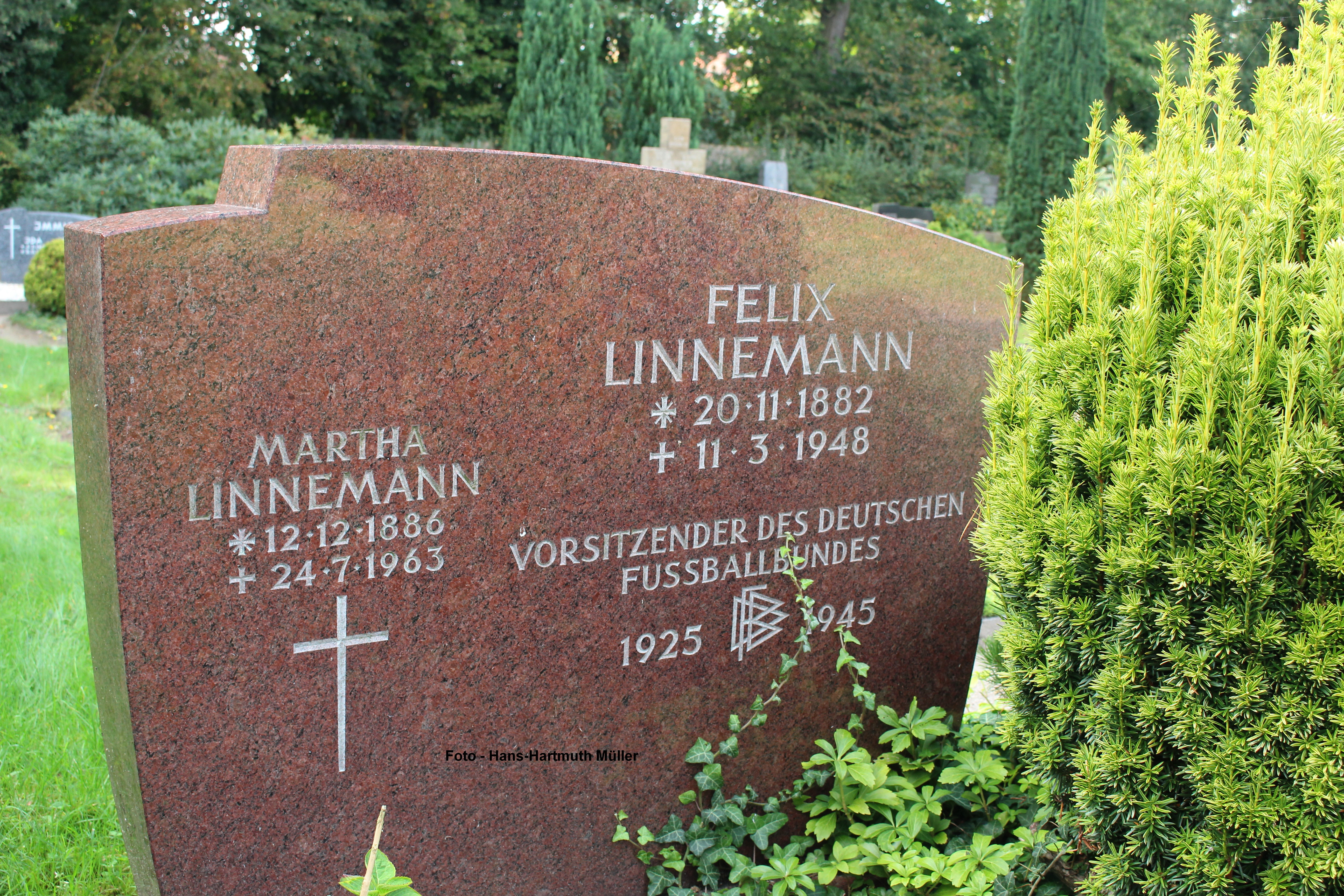 Grabstätte von Felix Linnemann in Steinhorst/Niedersachsen